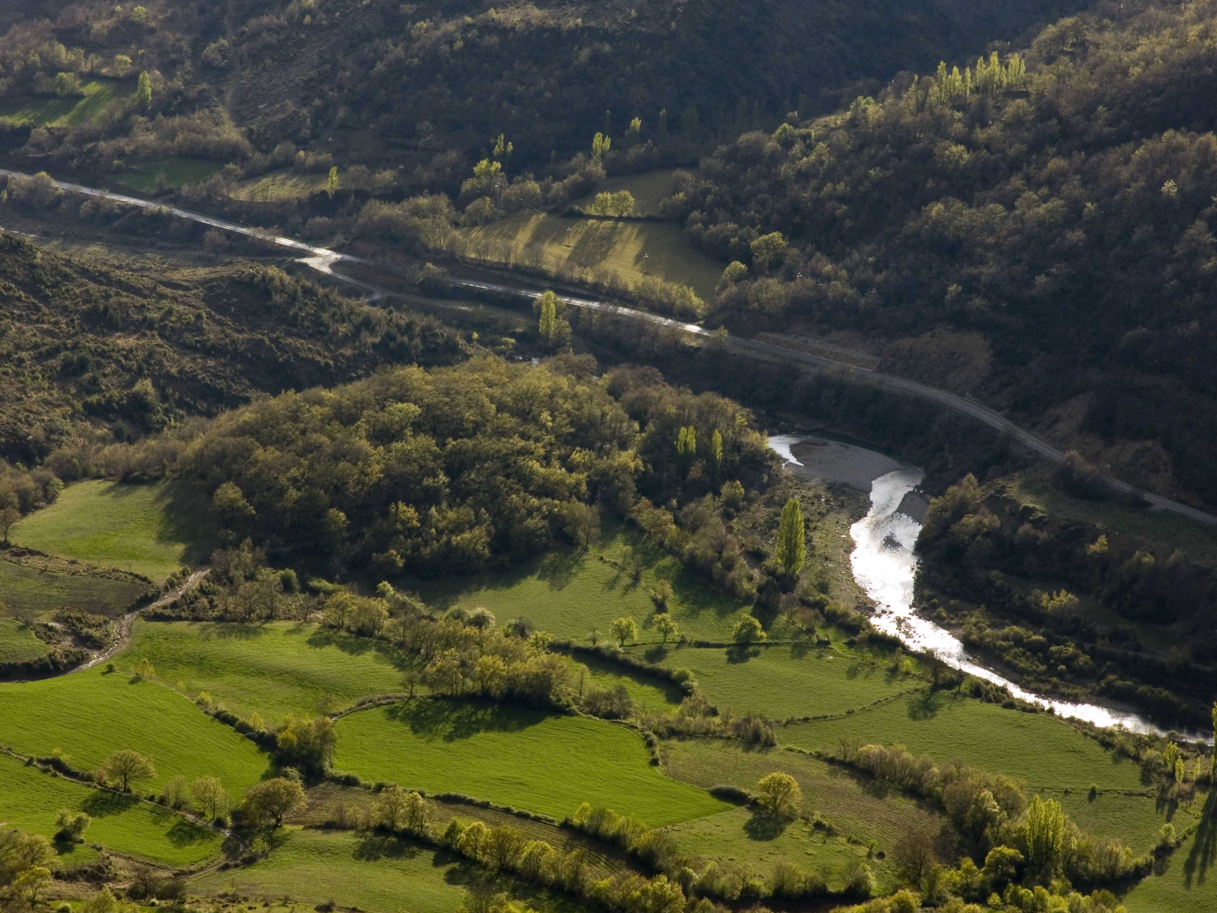 Foto feta des de dalt de Beranui, pujant la Serra de Sis. Curs mitjà del riu Isàvena, a la Baixa Ribagorça de l'Aragó.